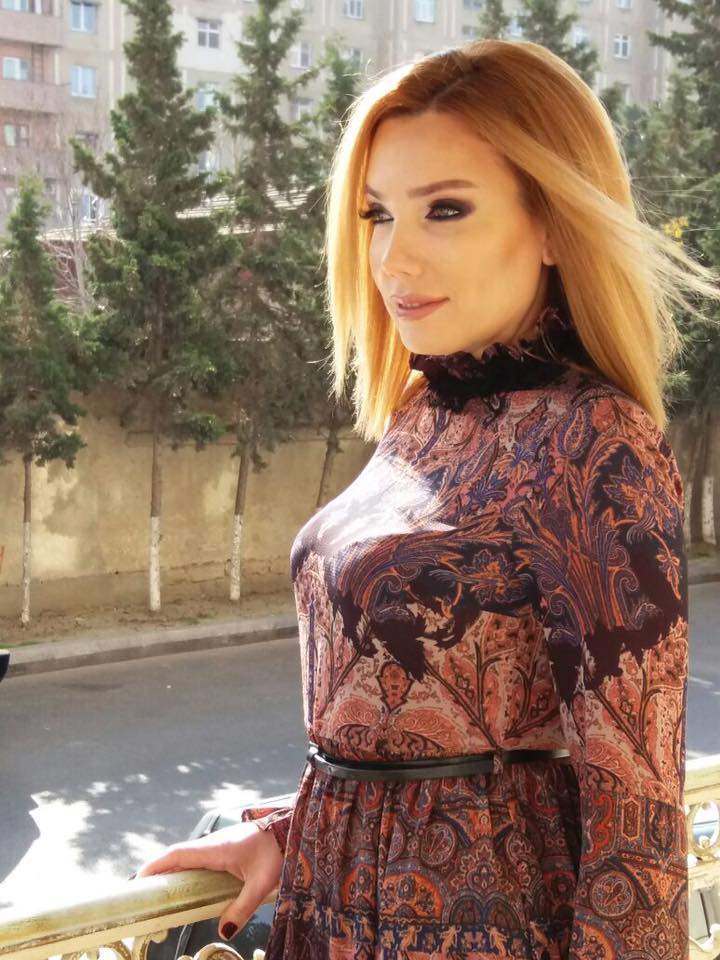 Gozel TV aparici Letafet Elekberova cazibedar xanim